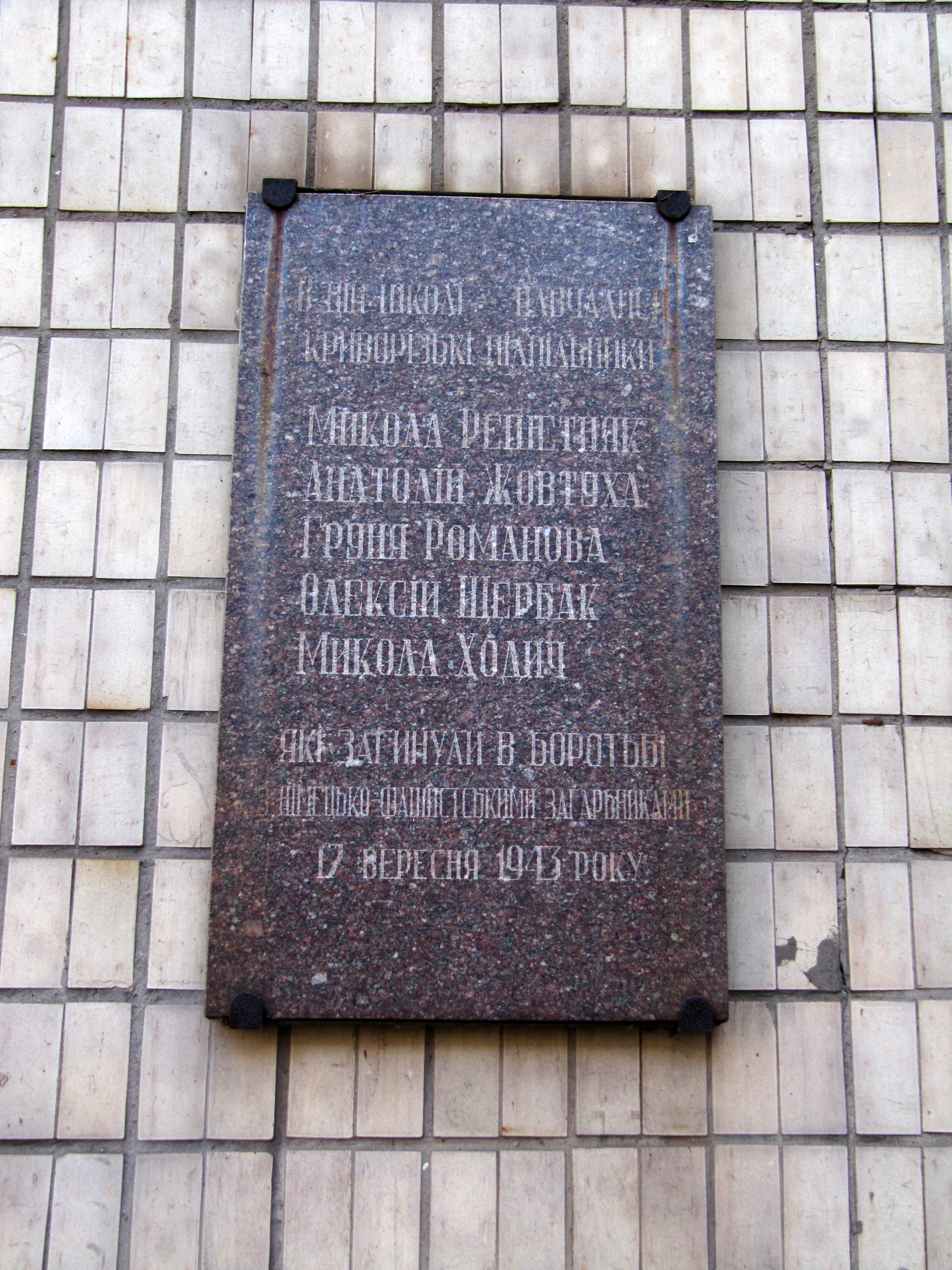 Школа в якій навчались п’ять комсомольців-підпільників, розстріляних 17 вересня 1943р., Кривий Ріг, вул. Орджонікідзе, 40, СШ № 15 ім. М. Решетняка. Нині вулиця Криворіжсталі. Меморіальна дошка